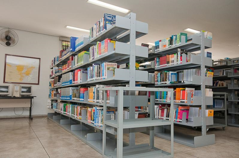 Biblioteca - Apresentação